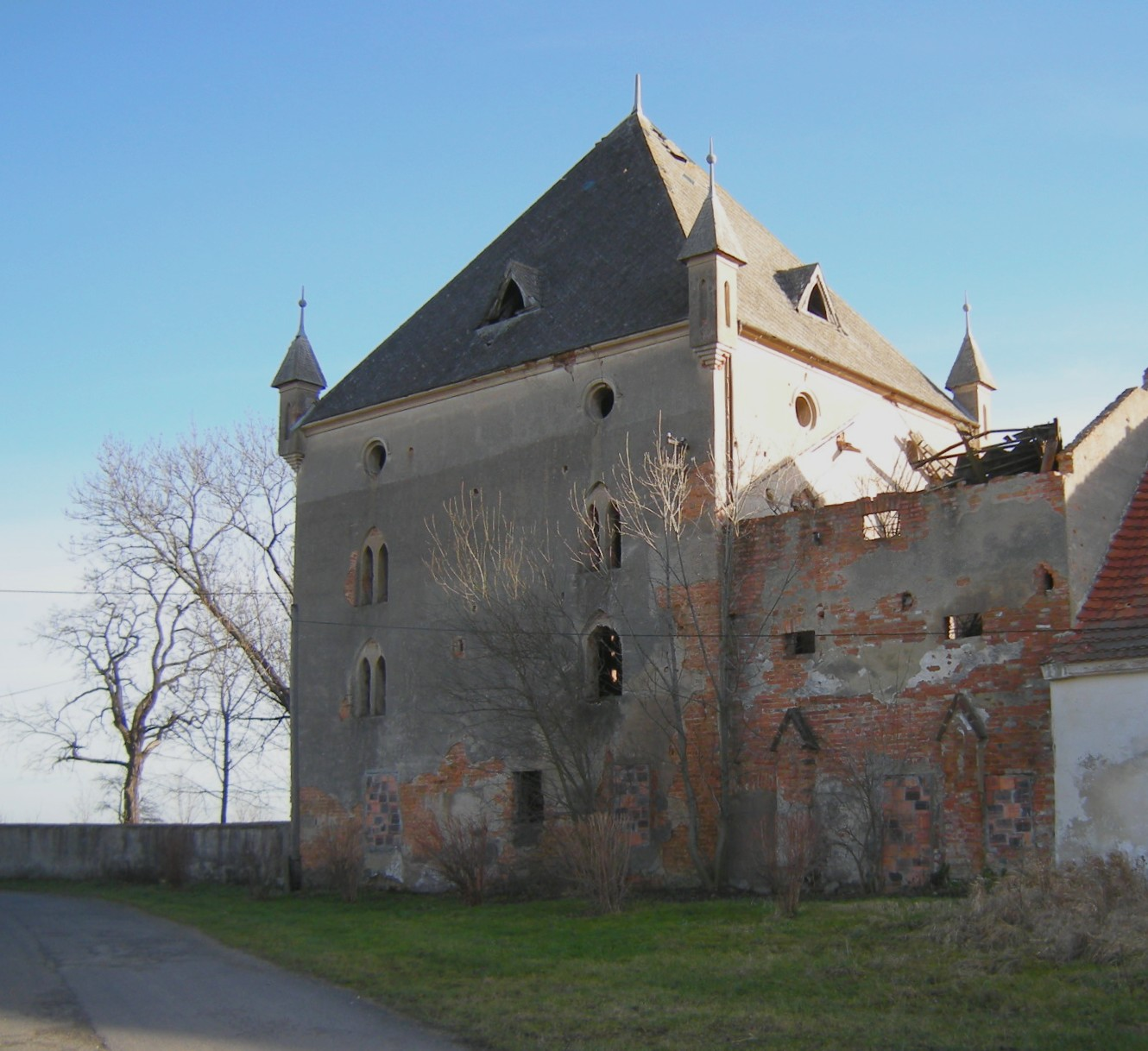 Baszta dworu w zespole dworskim Lisie Kąty, Paczków 06.1964.